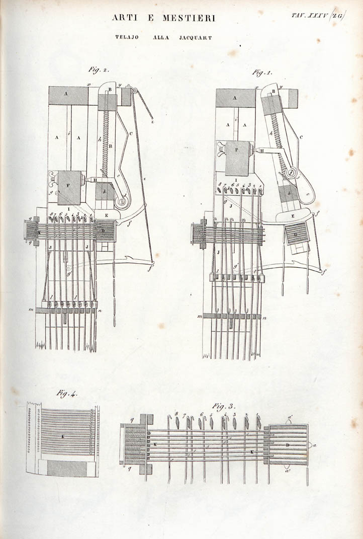 Telaio Jacquard tratto da Nuova enciclopedia popolare. 13